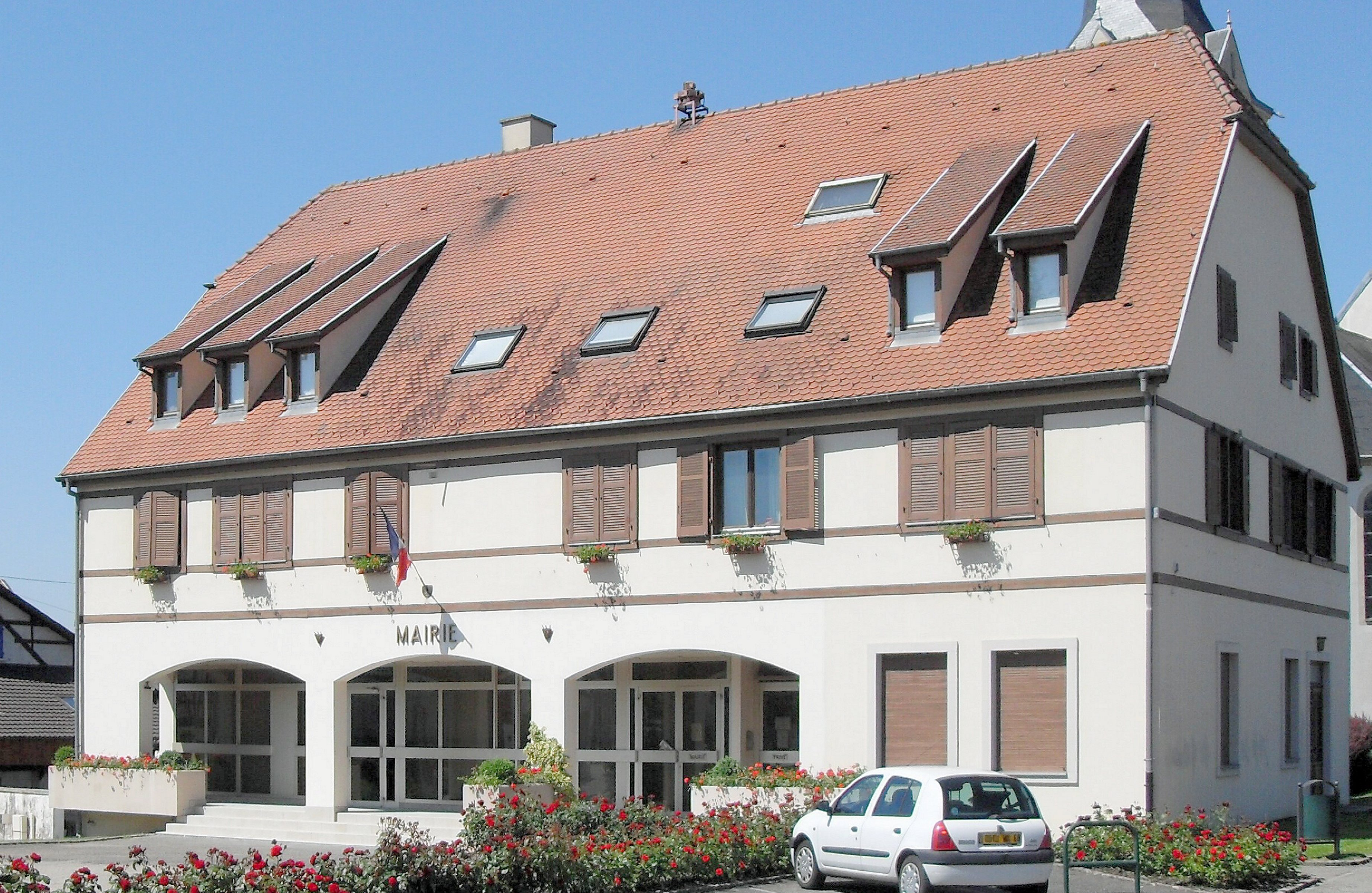 La mairie d'Heimsbrunn